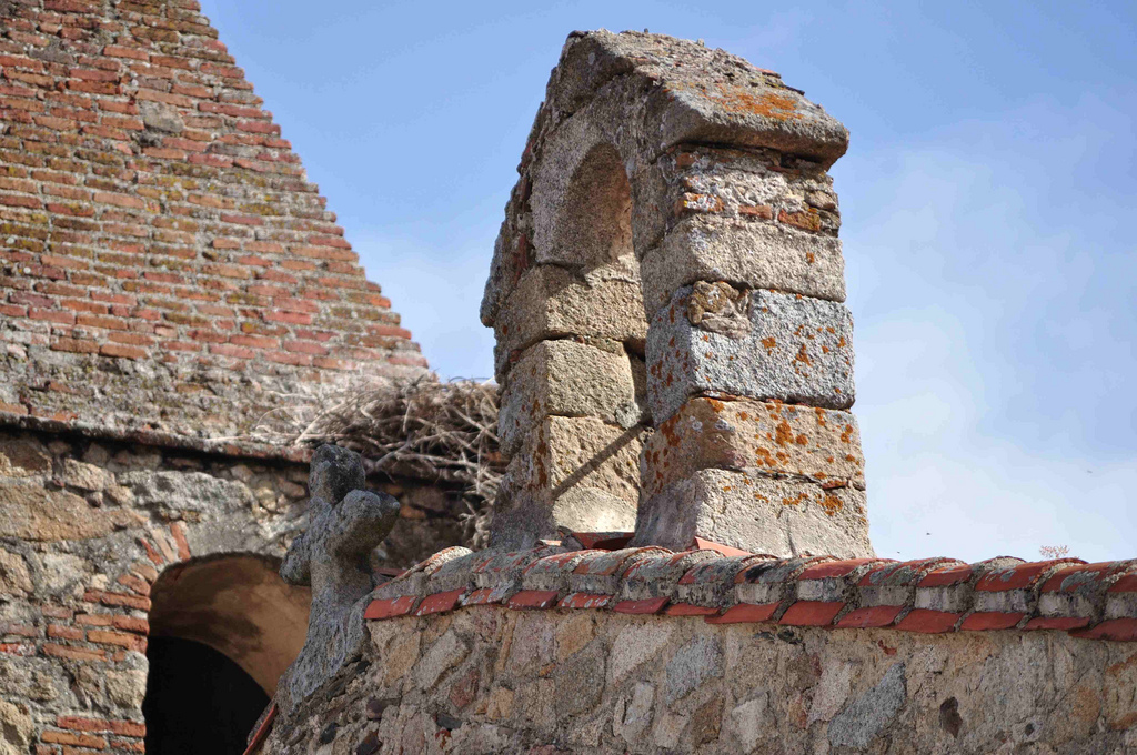 Detalle iglesia de la Veracruz en Santa Cruz de la Sierra